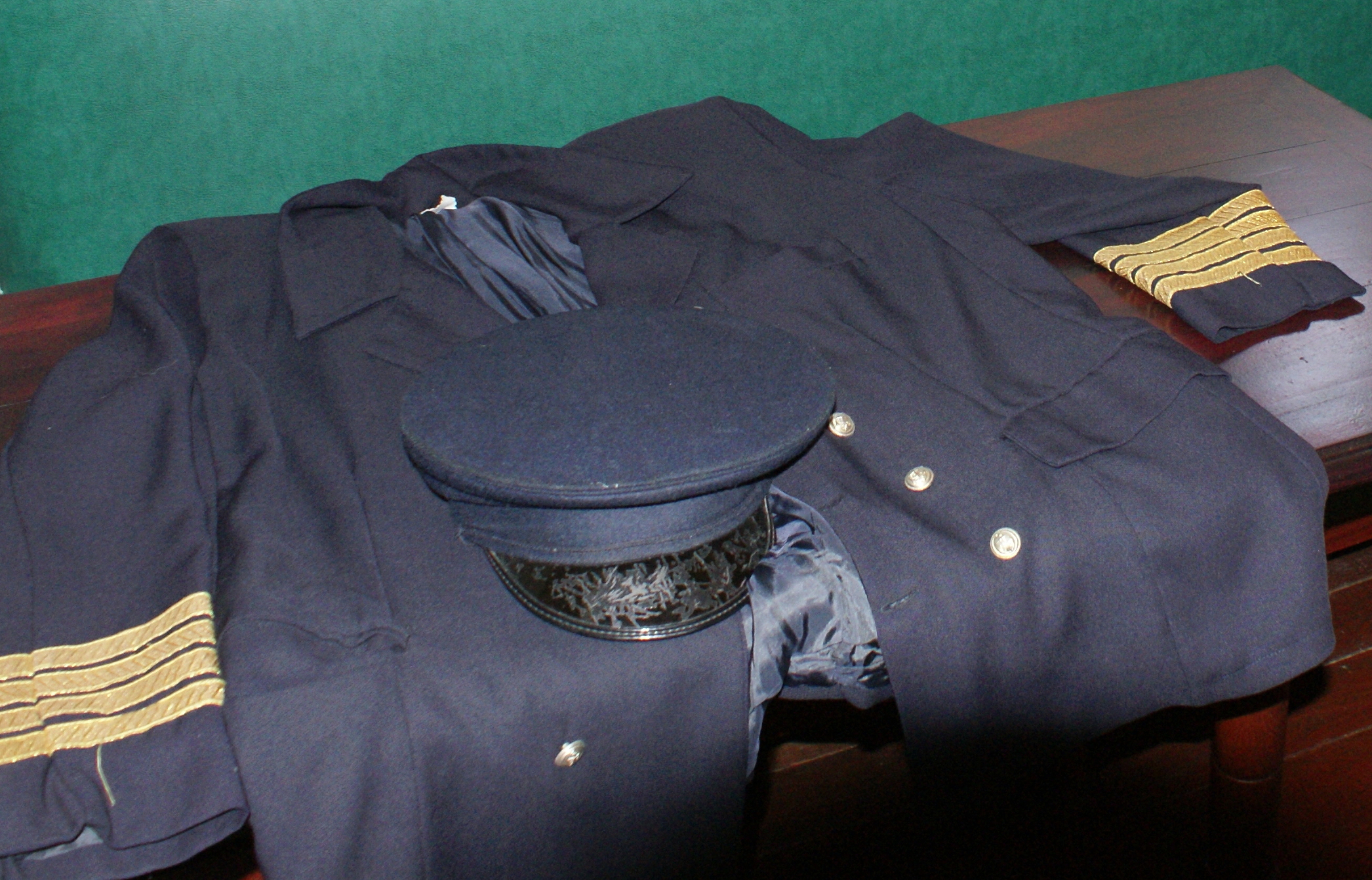 Vareuse du commandant étendue sur la table de son bureau en 2008, trois-mâts carré Duchesse Anne (Musée portuaire de Dunkerque, Nord, France).